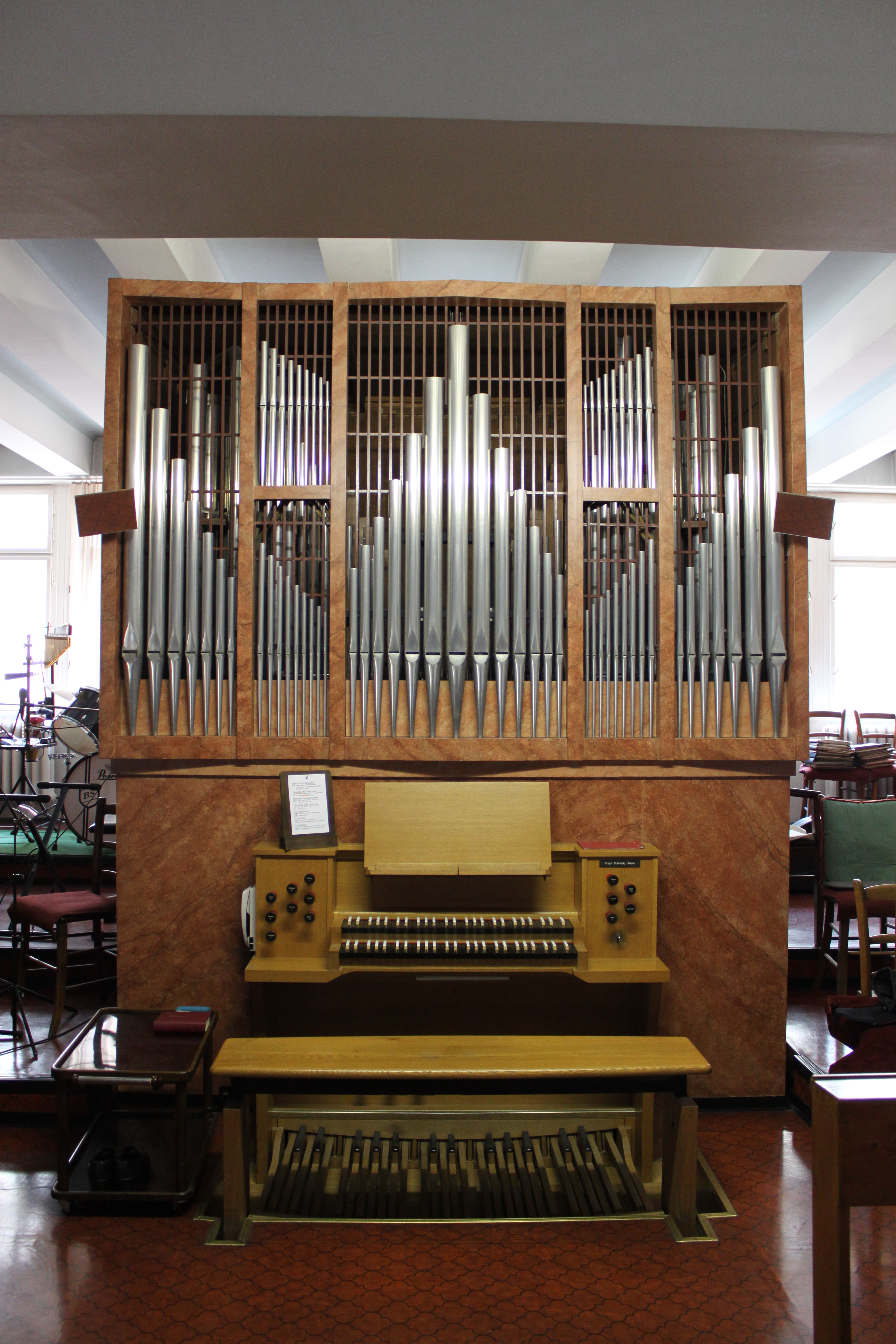 Orgel der Dreifaltigkeitskirche in Wien-Favoriten, erbaut von Gregor Hradetzky (nur Hauptwerk, Brüstungspositiv nicht im Bild)